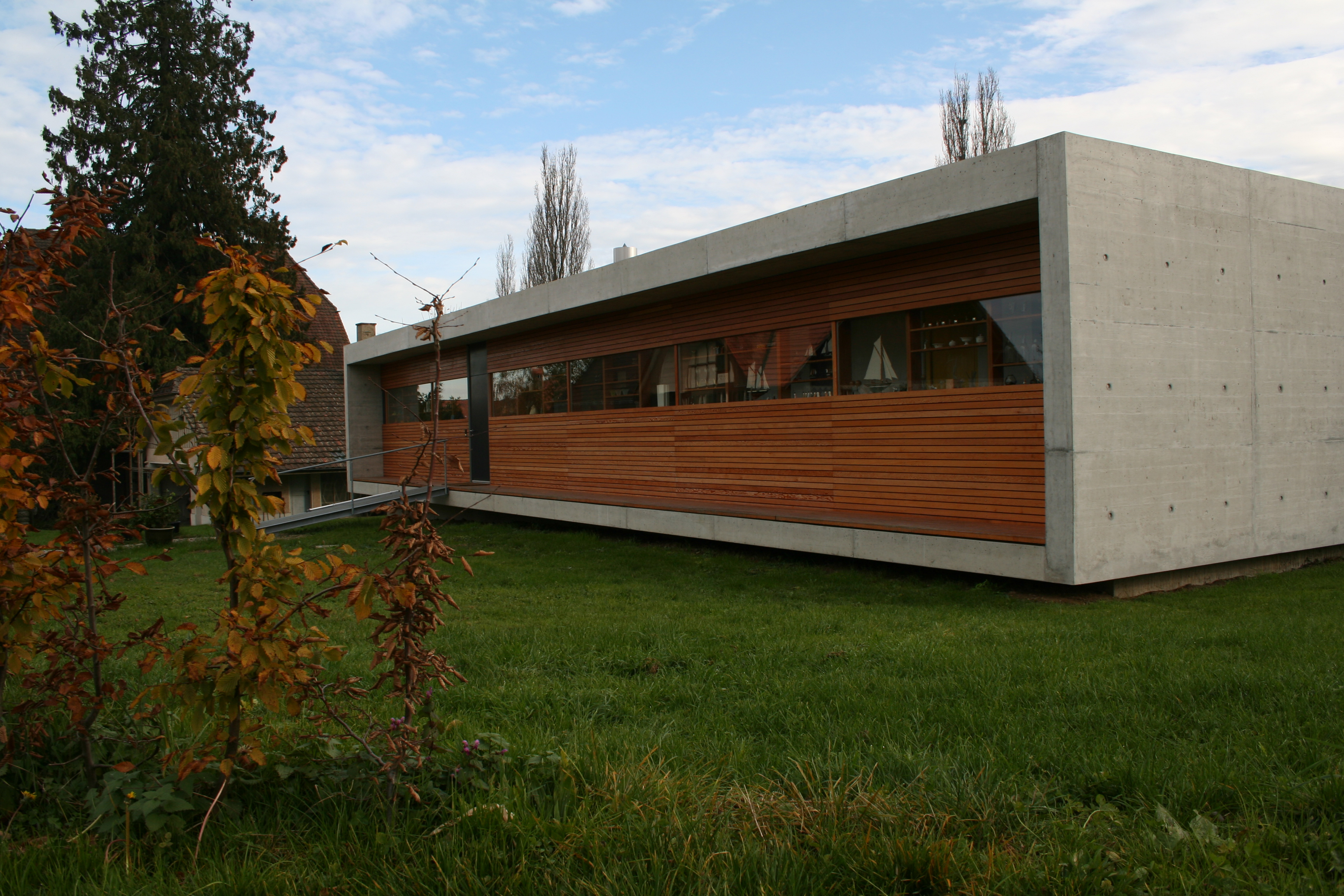 Privates Wohnhaus in Hessigkofen, SchweizDas Haus steht in starkem Kontrast zu dem sehr ländlichen und alten restlichen Dorfbild. Boshaft-ironisch wird es im Dorf auch «Seilbahnstation» genannt. Ansicht in Streetview zur Betrachtung ringsherum